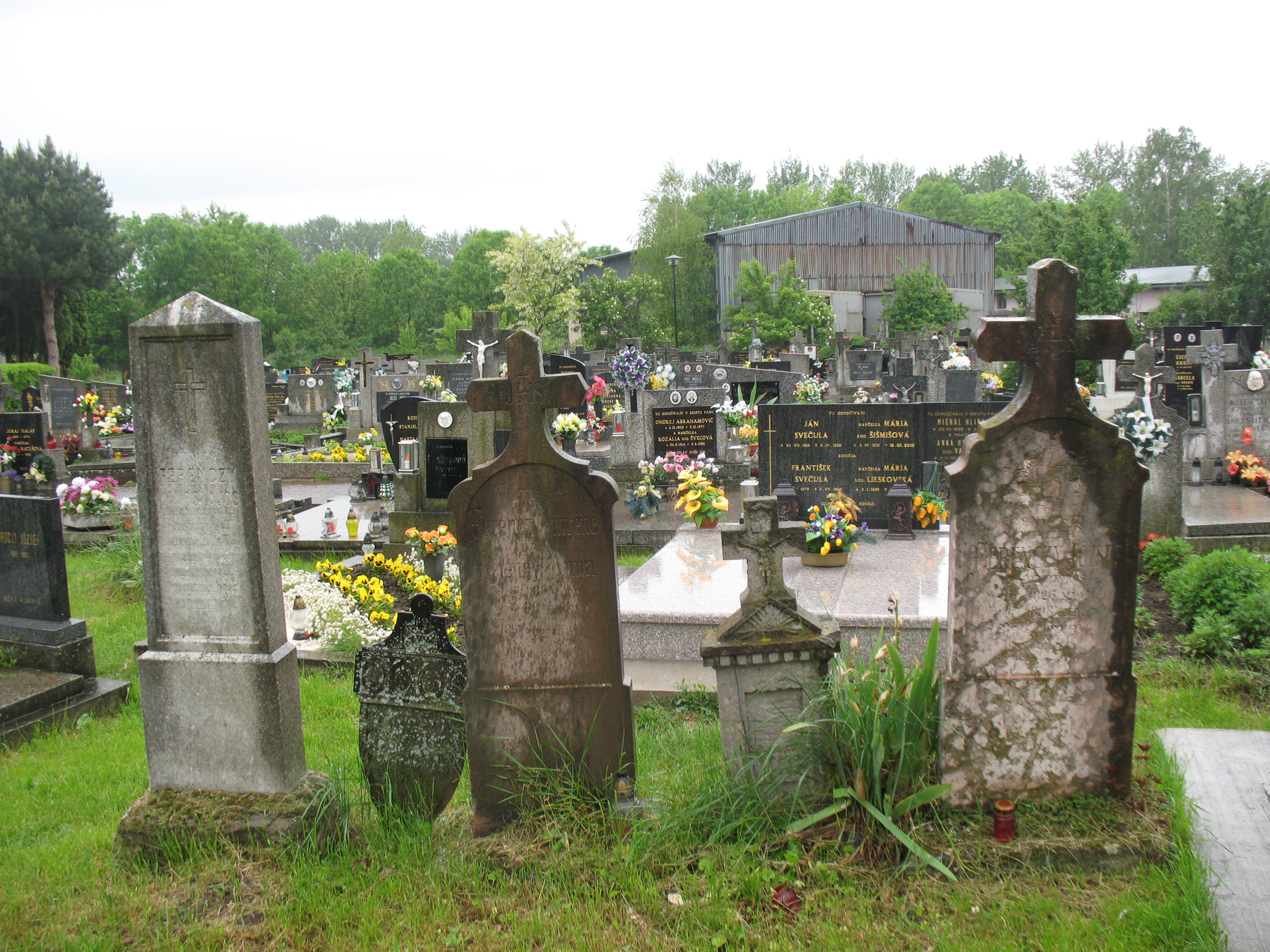 Alsószőllős